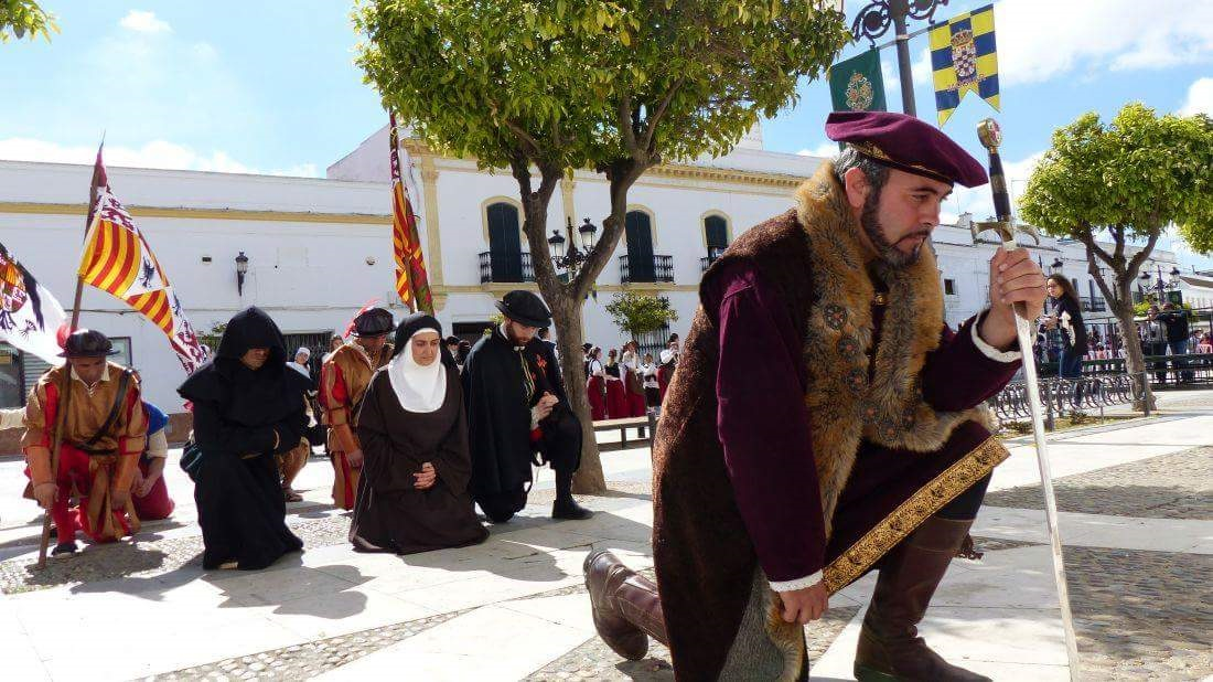 Recreación del Voto Colombino a su llegada al Monasterio de Santa Clara de Moguer. (España)